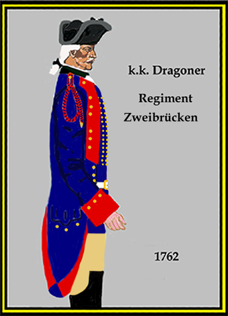 Österreichishes Dragoner-Regiment „Zweibrücken“ 1762 (Aus: L.& F. Funcken - „L'Uniforme et les Armes des soldats de la guerre en dentelle II“) Castermann (Tournai 1976)